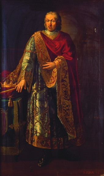 Retrato imaginario del rey Juan II de Aragón (1398-1479), que fue hijo del rey Fernando I de Aragón y de la reina Leonor de Alburquerque.